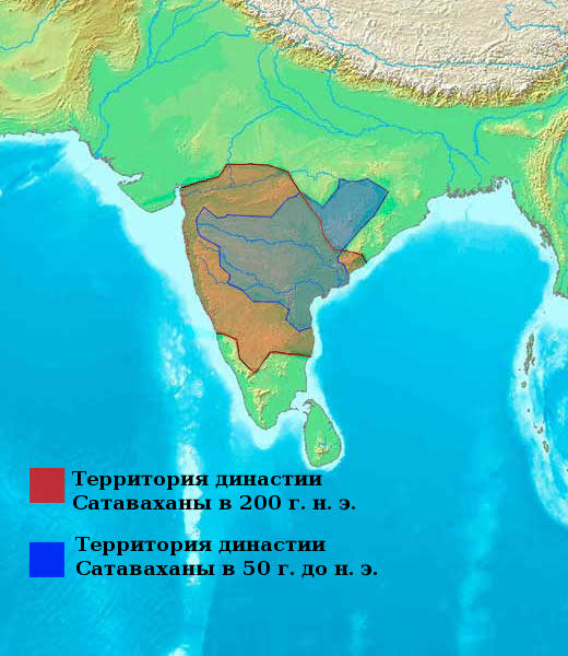 Terrytory of Satavahana dynasty in 200 AD and 50 BC